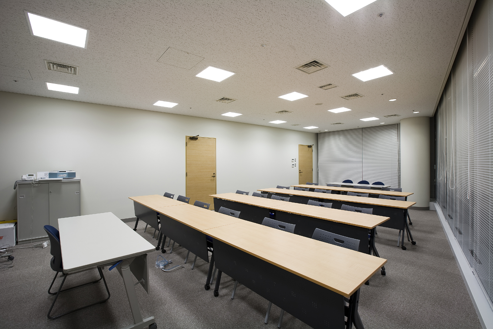 駐日韓国文化院セミナー室「ベウムト」